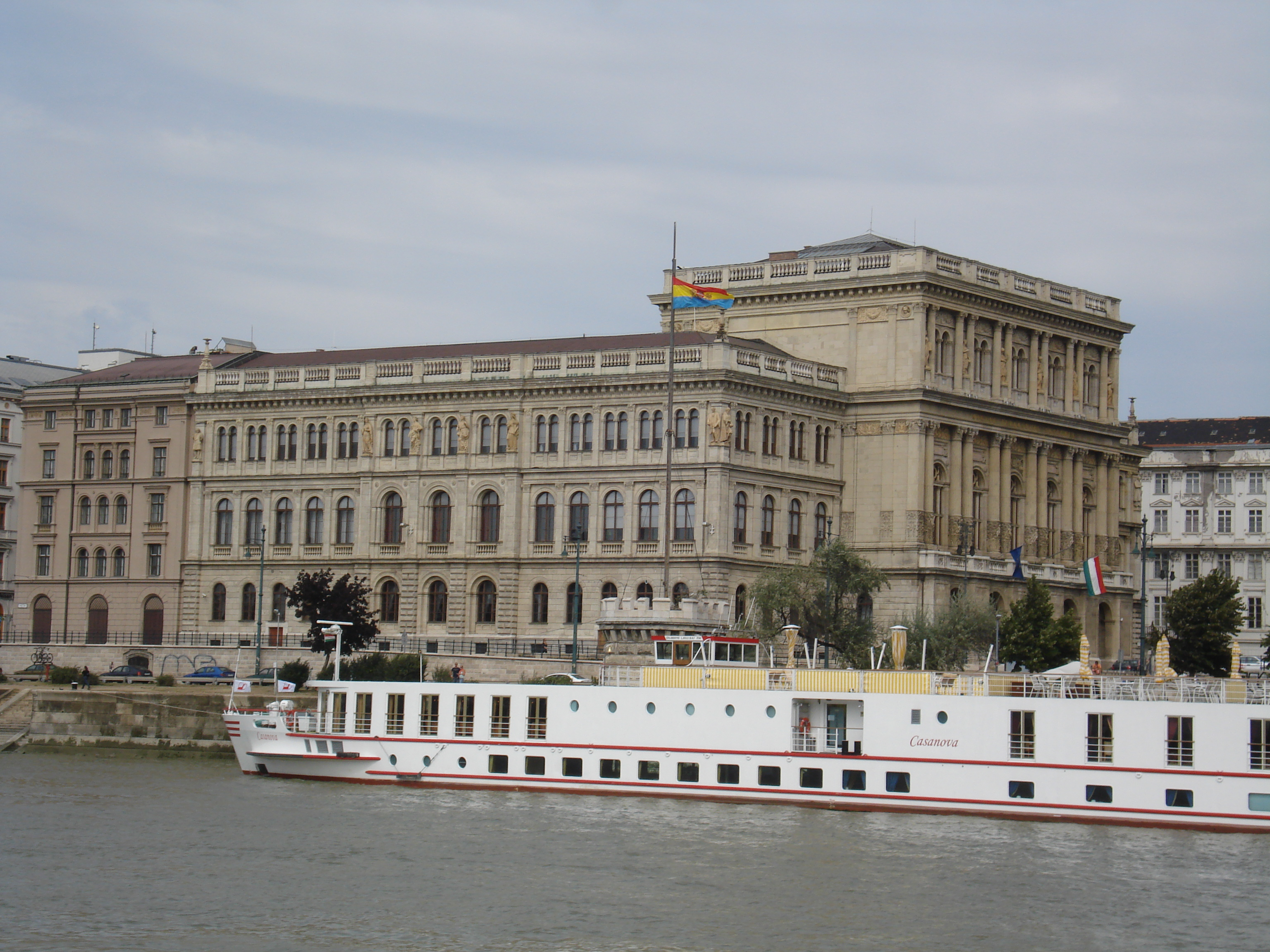 Az MTA épülete, Budapest